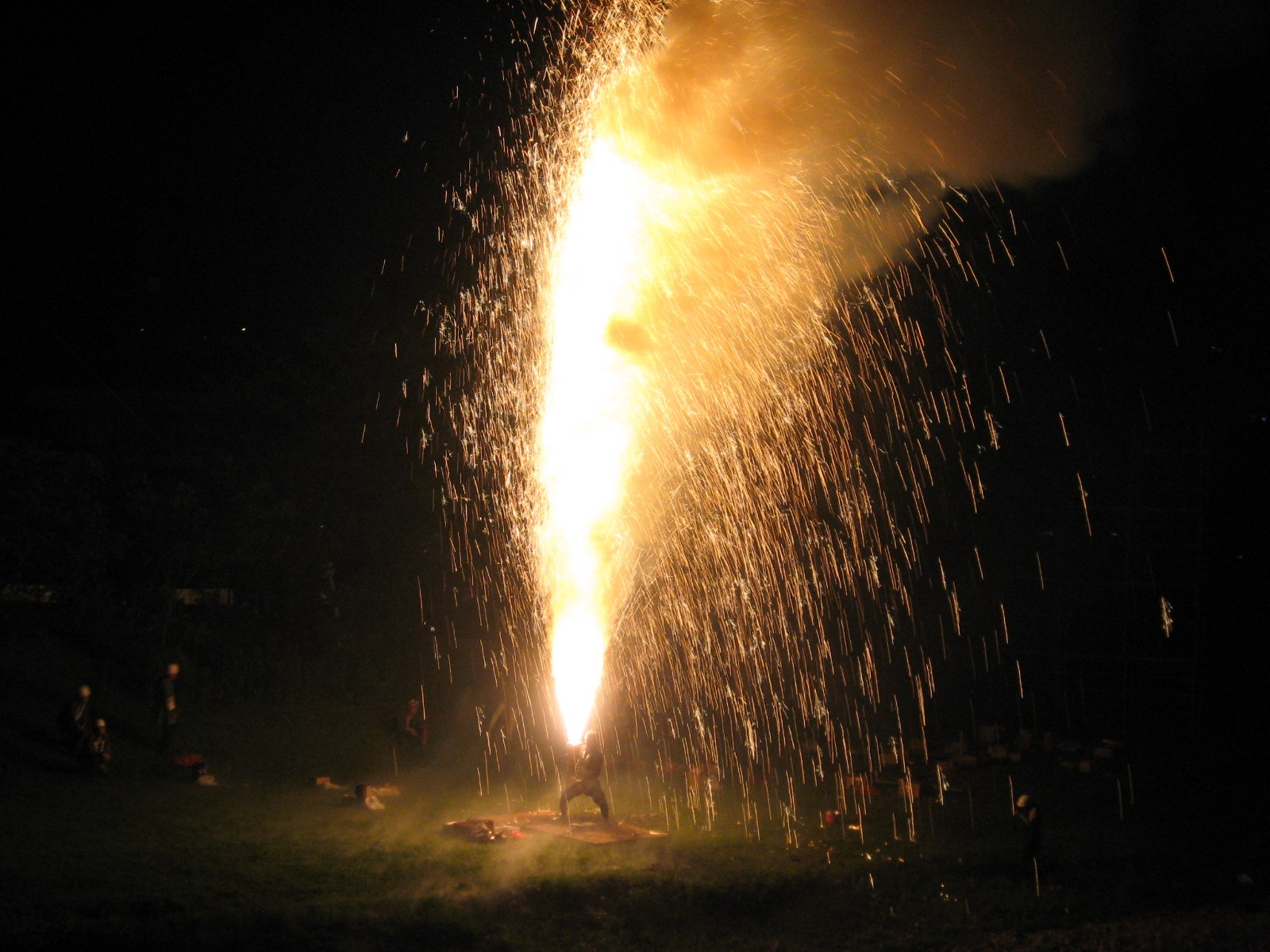 Tezutsu Hanabi(Hand Held Fireworks)（御油夏まつりでの手筒花火）